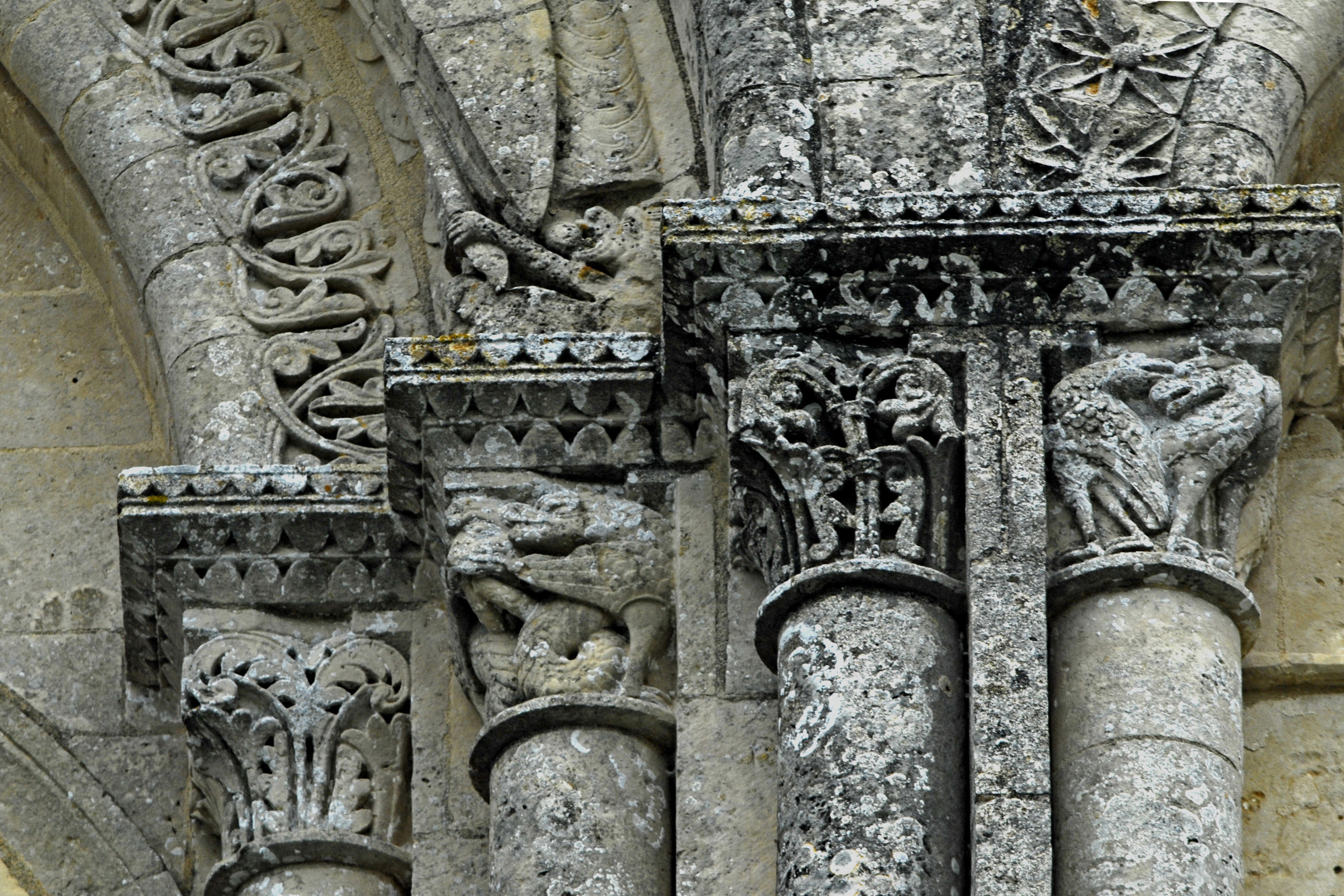 St.-Pierre Aulnay, Kapitelle, Fenster über Südportal, rechts